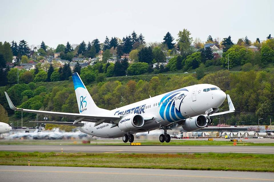 EgyptAir Boeing 737-800 SU-GEH Special 85 Anniversary